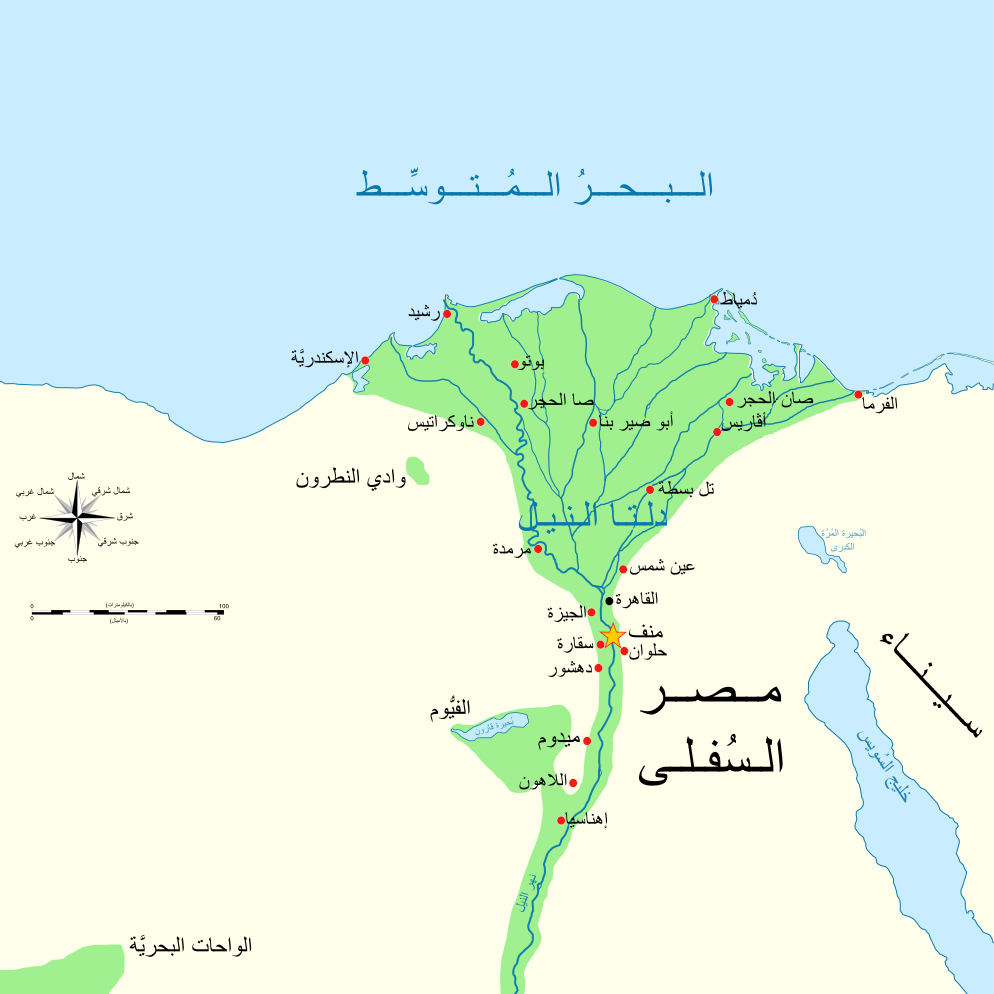 خارطة مصر السُفلى القديمة، يظهرُ فيها نهر النيل وأهم المُدن والمواقع للفترة المُمتدَّة من سنة 3150 ق.م إلى سنة 30 ق.م.